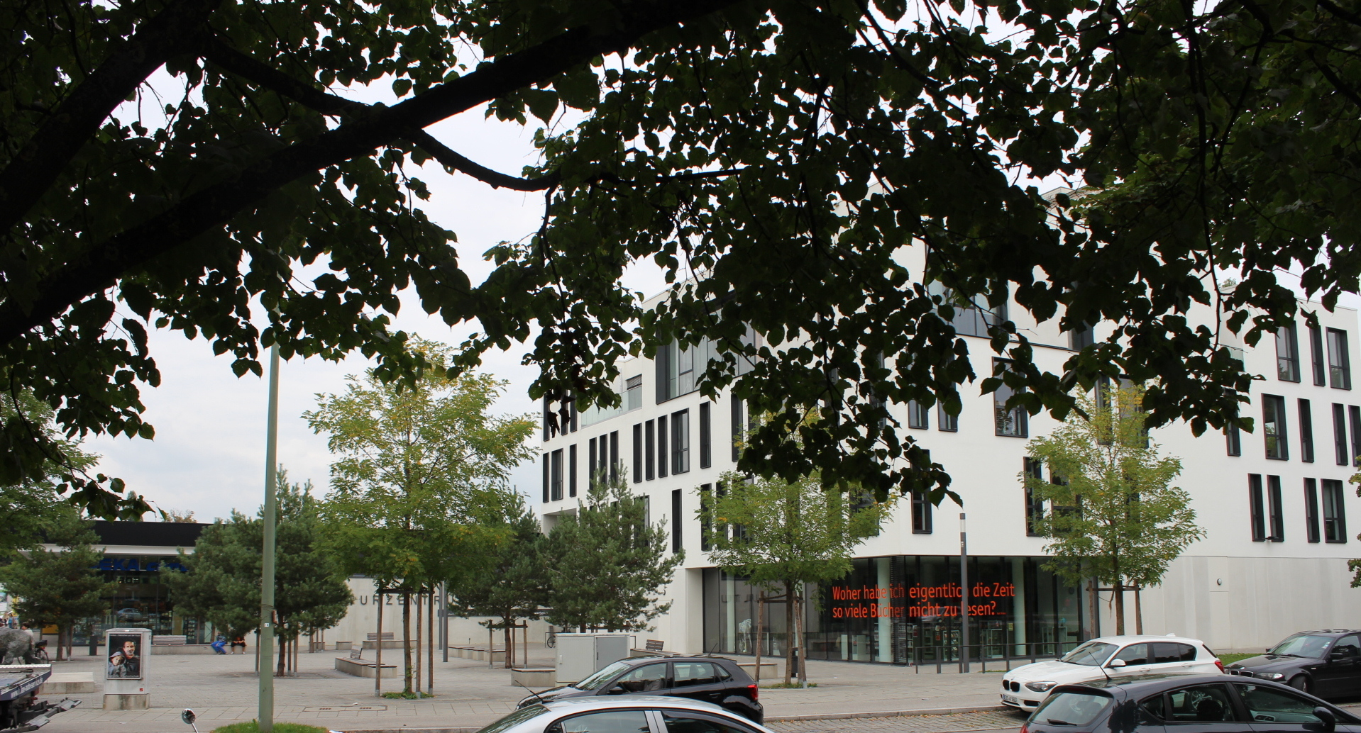 Kulturzentrum 2411, Blodigstraße 4, München Hasenbergl